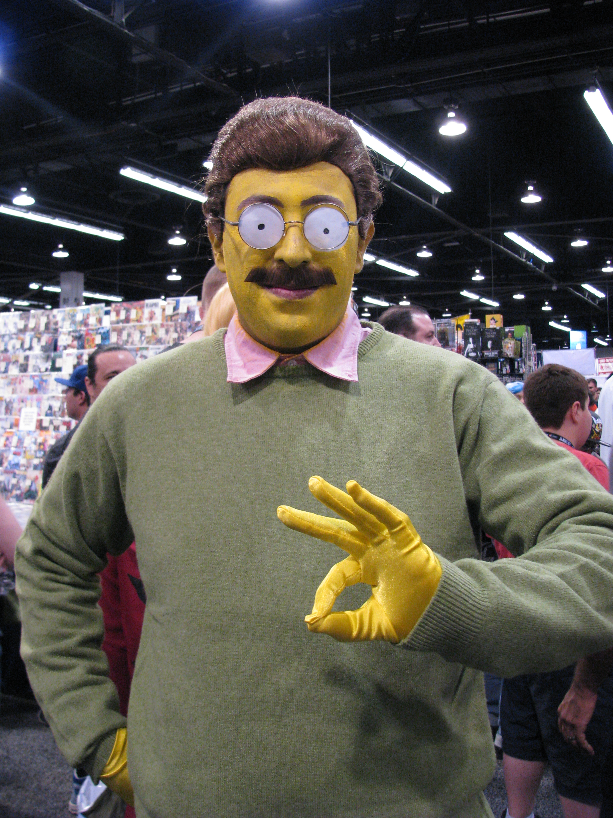 Stupid sexy Flanders